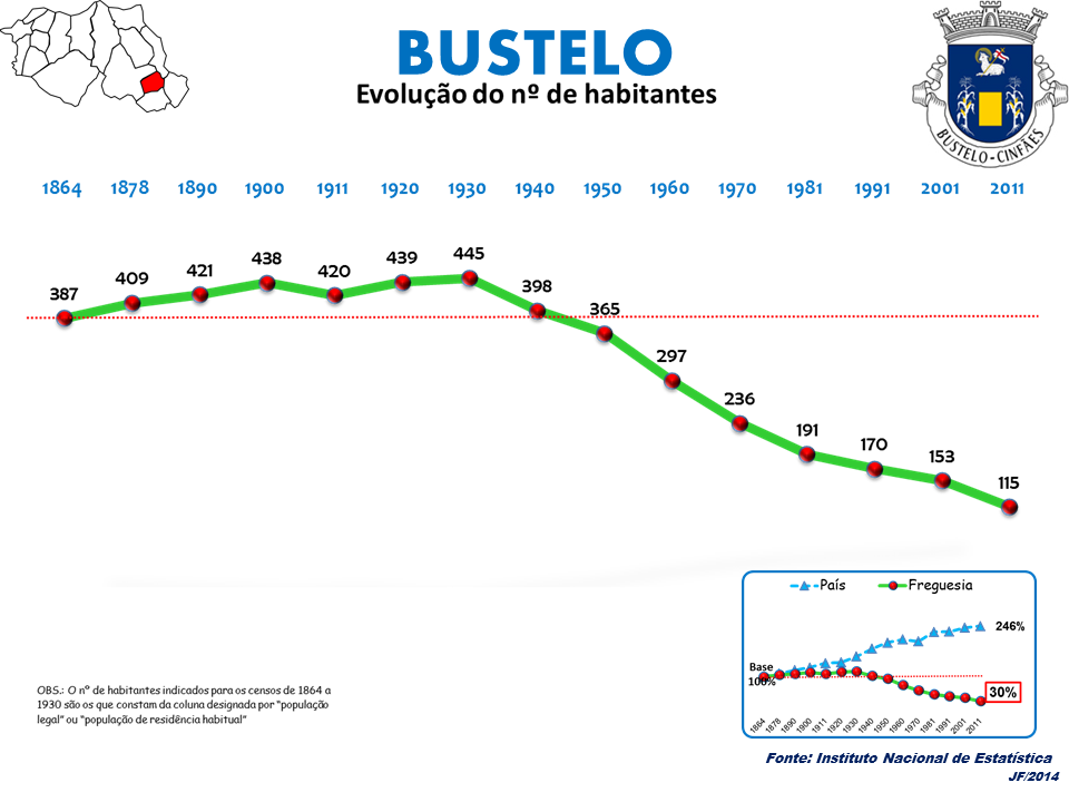 Evolução da População 1864 / 2011